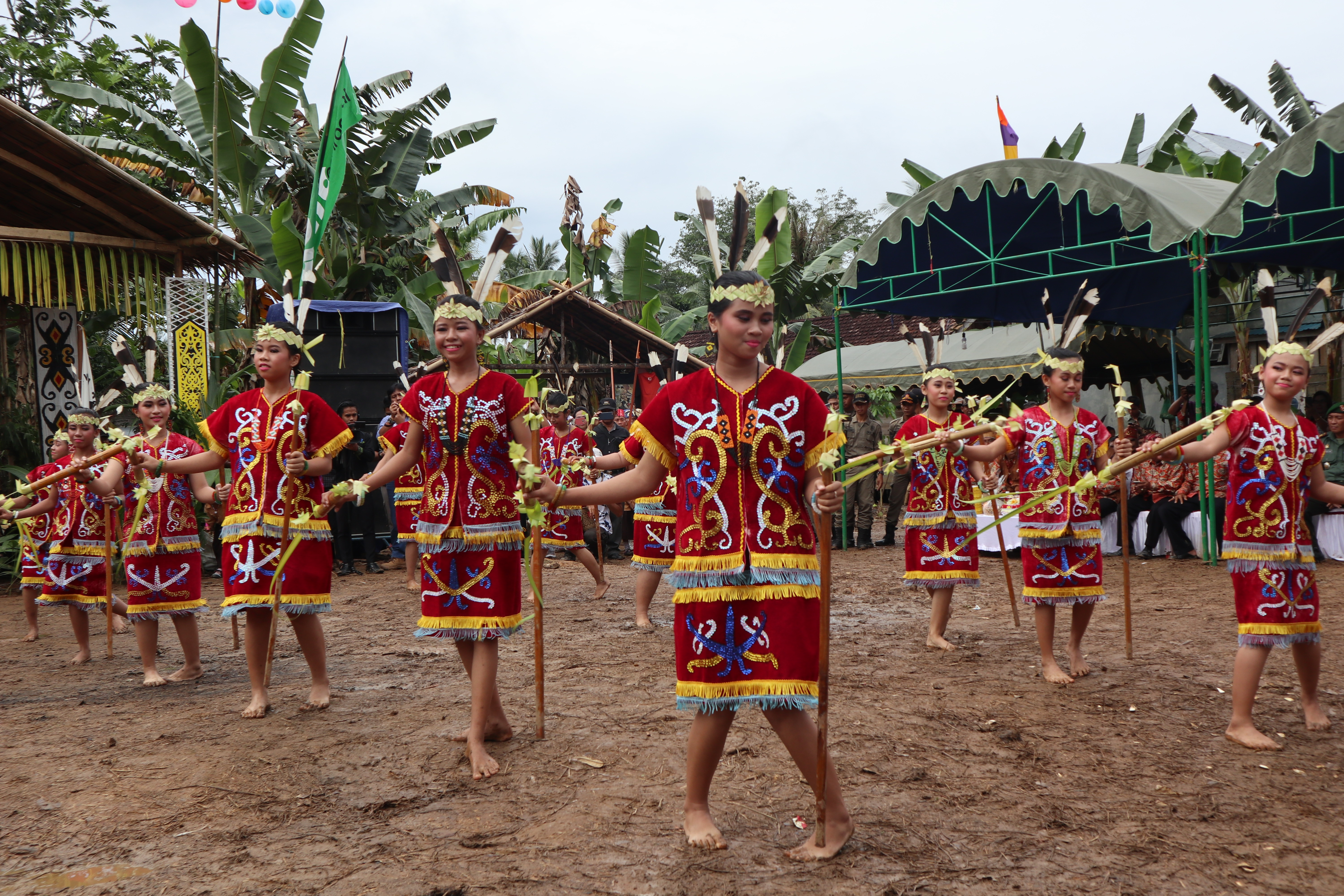 Tari Gintur yang dibawakan oleh remaja dari suku Dayak Halong dalam Festival Pesona Budaya Dayak Meratus IV di Kabupaten Balangan, Kalimantan Selatan pada 31 Maret 2018.